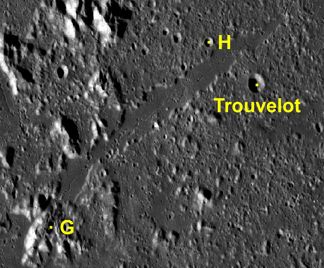 Cráter lunar Trouvelot. Cráteres satélite. (Imagen LRO)